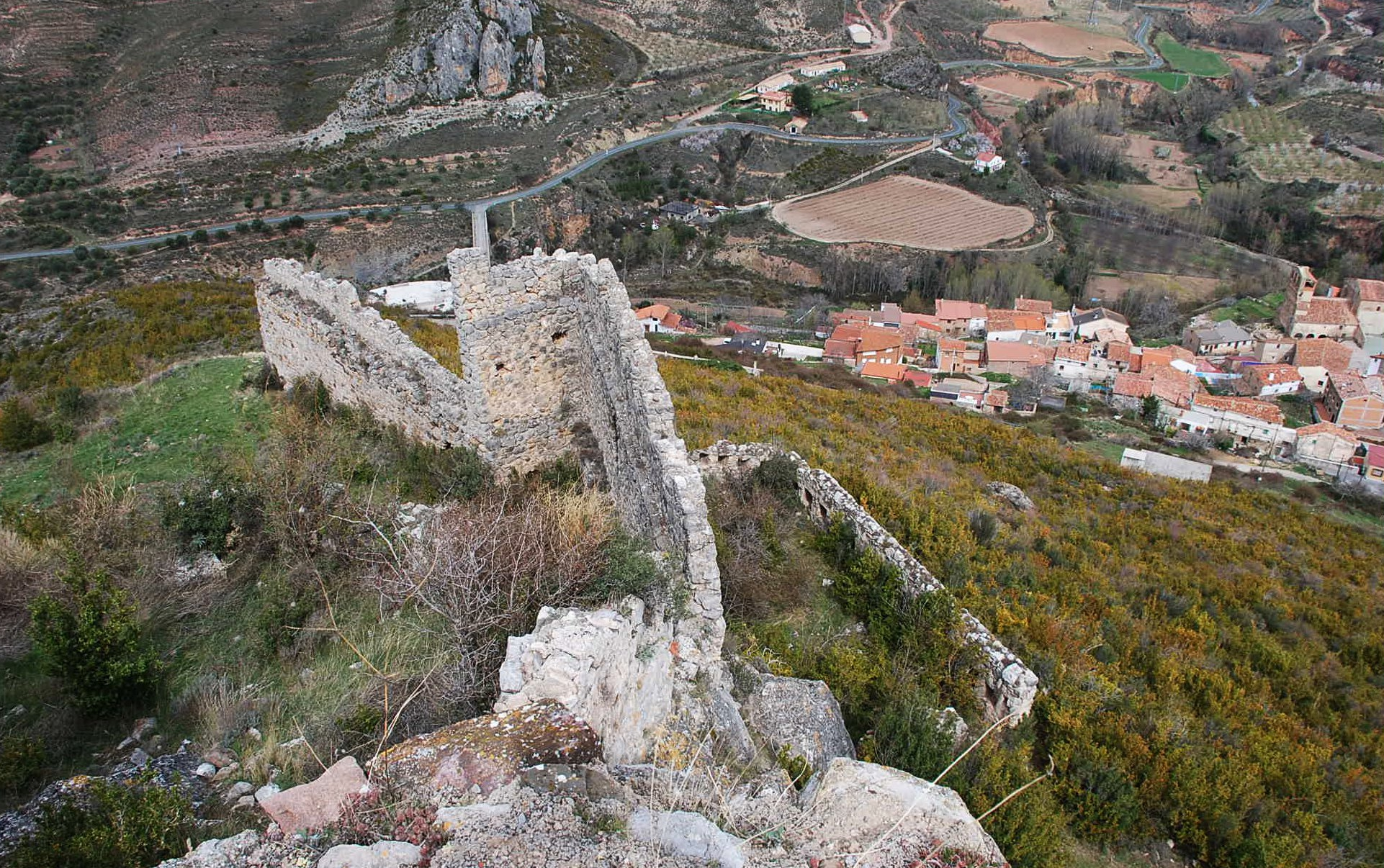 Castillo de Jubera en La Rioja, España.